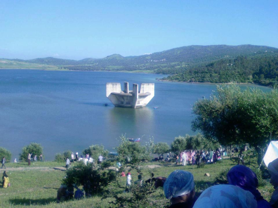 متنزه سد واد المخازن